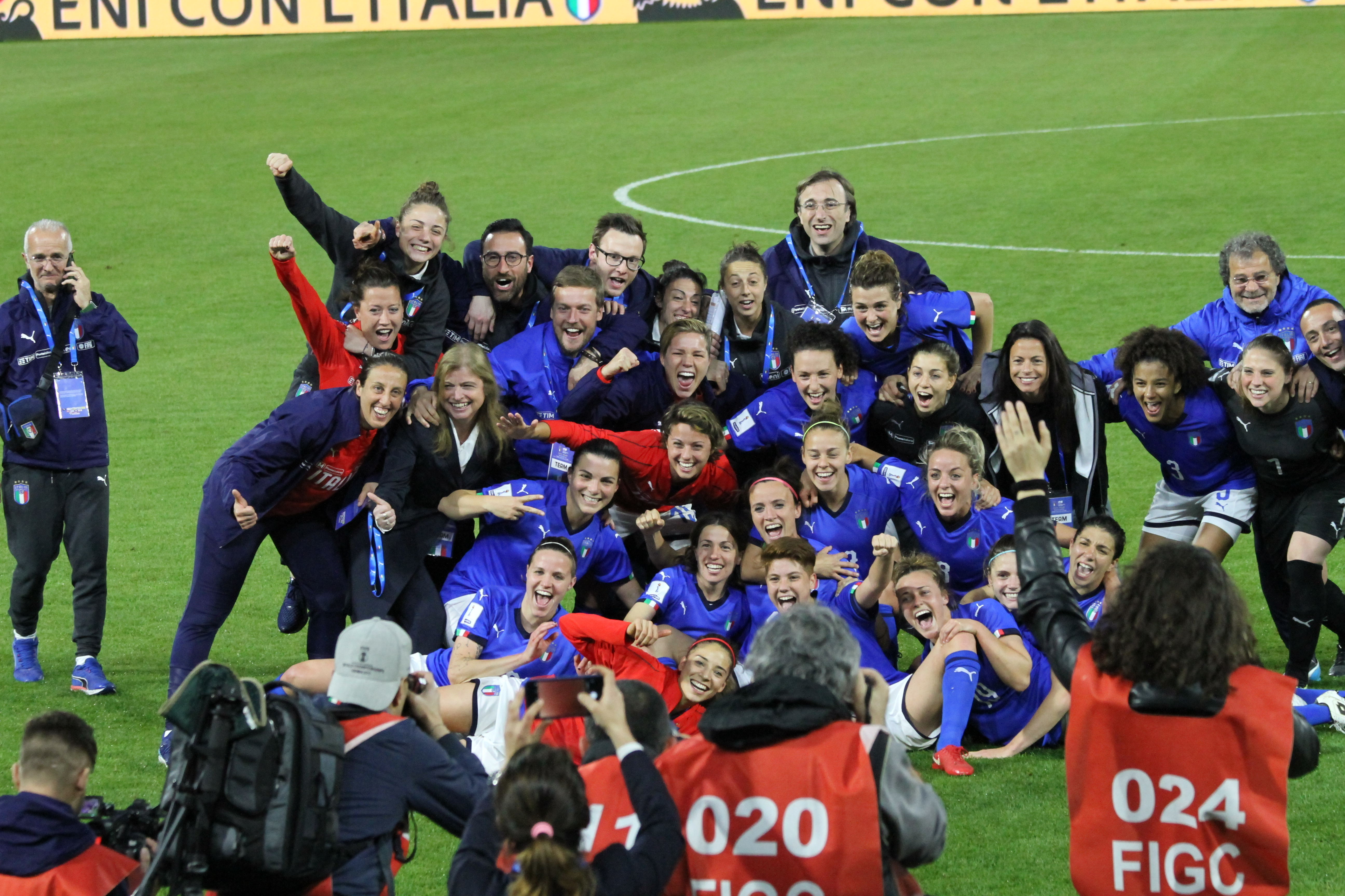 Ferrara, 10 aprile 2018: Italia vs Belgio, qualificazioni al Mondiale di Francia 2019, festeggiamento della nazionale italiana a fine partita.